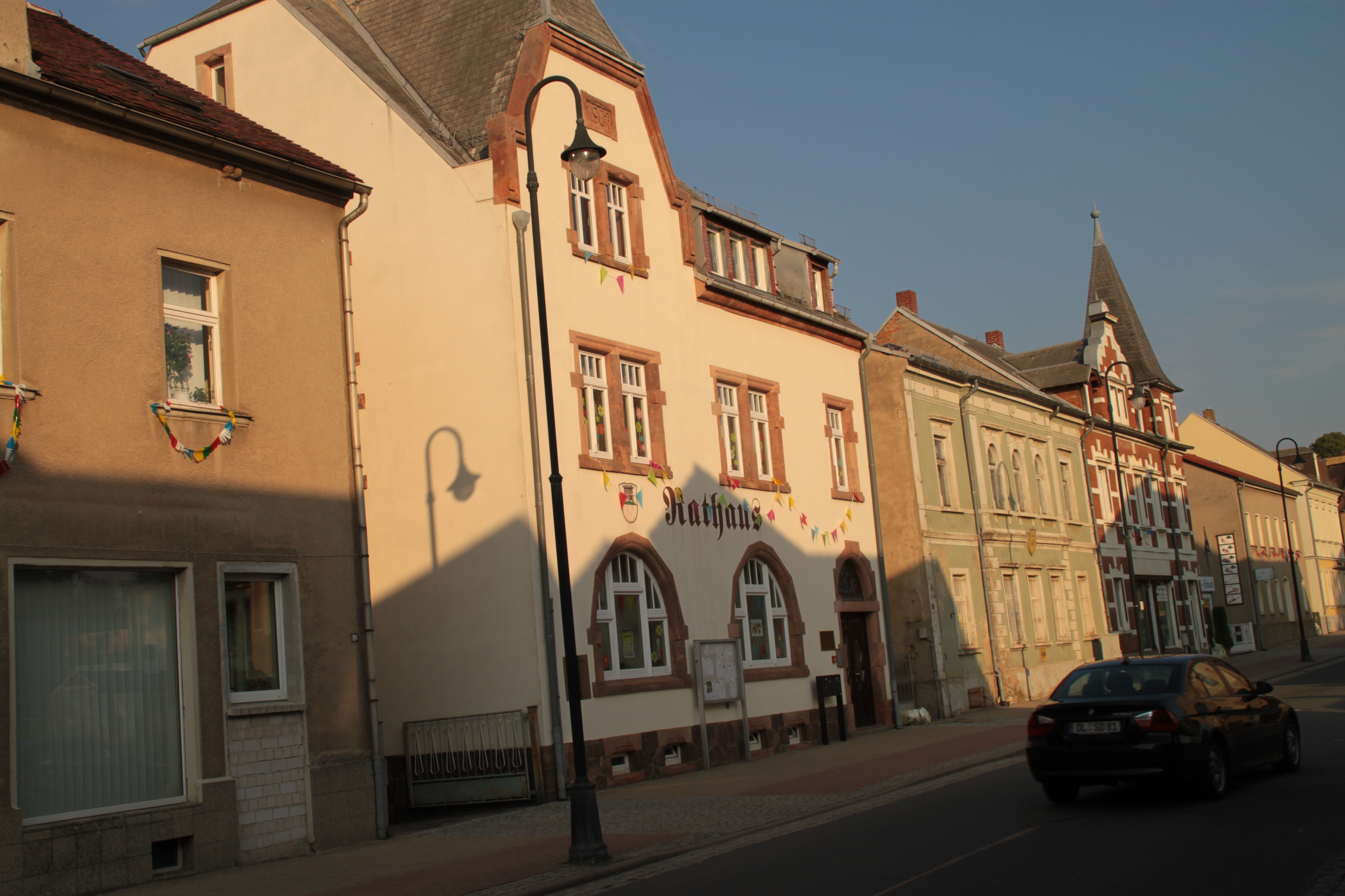 Gemeindeamt von Ostrau